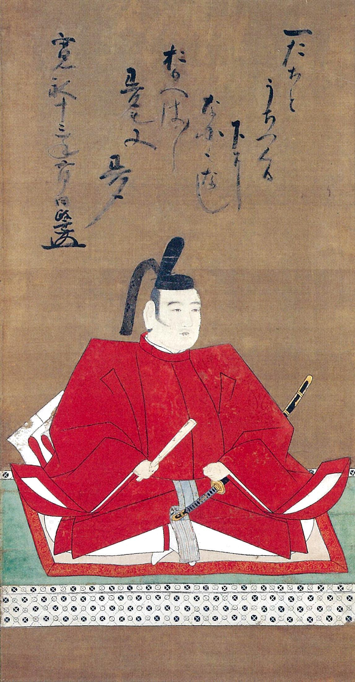 江戸時代前期の加賀藩の家老・本多政重（1580 - 1647）の肖像画・自讃あり。1636年作。